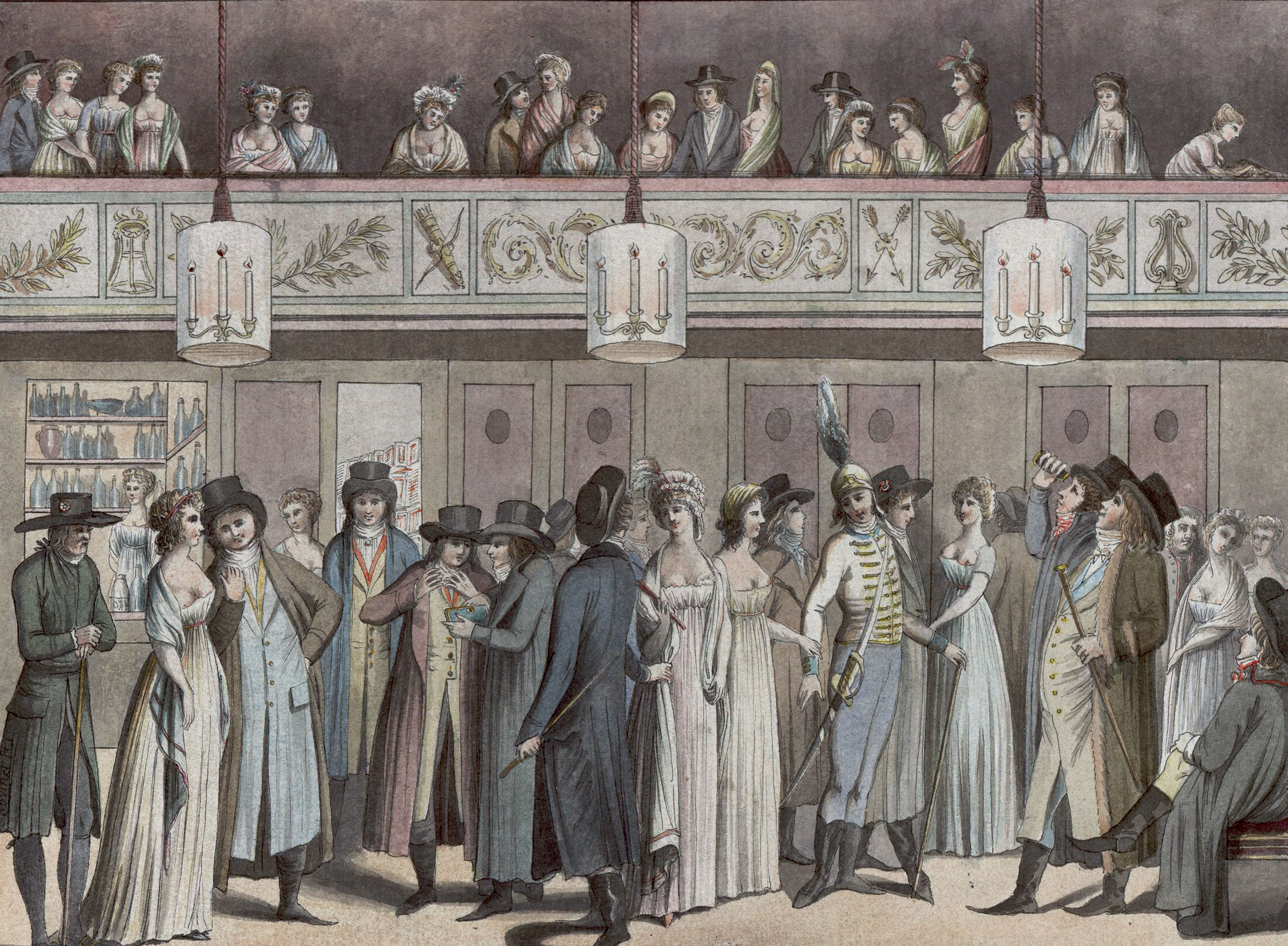 Foyer du Théâtre Montansier au Palais-Royal). Collection Hippolyte Destailleur (1822-1893).